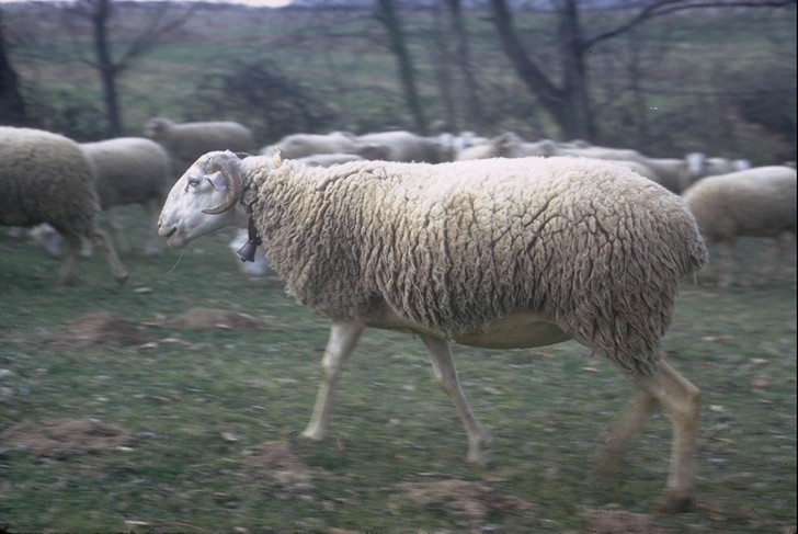 Brebis de race lourdaise, photographiée à Bourréac, près de Lourdes, dans les Hautes-Pyrénées